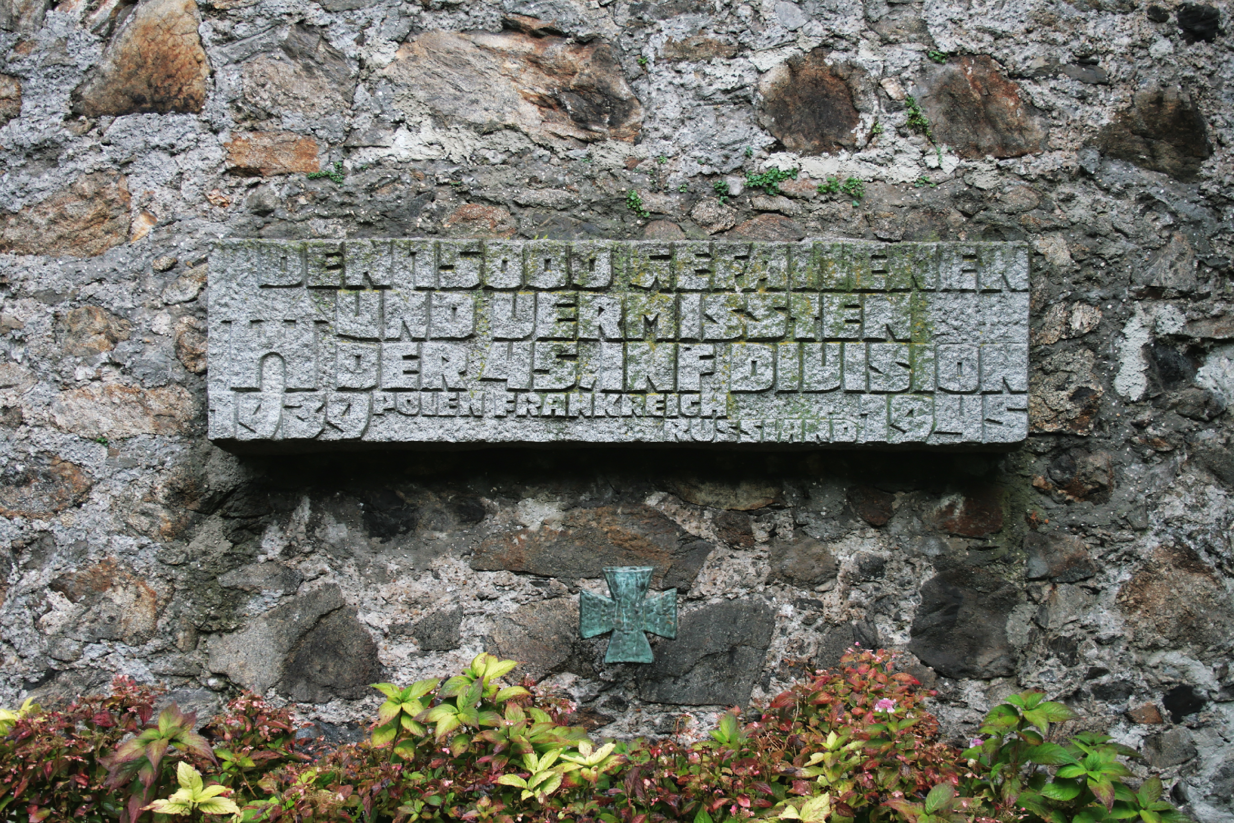 Befestigung des Linzer Schlosses: Gedenktafel für die 45. Infanteriedivision an der westlichen Seite des Eckrondells